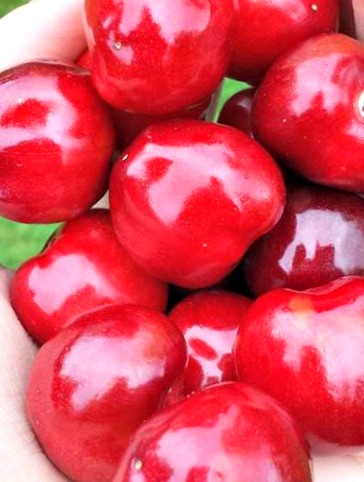 Qershia